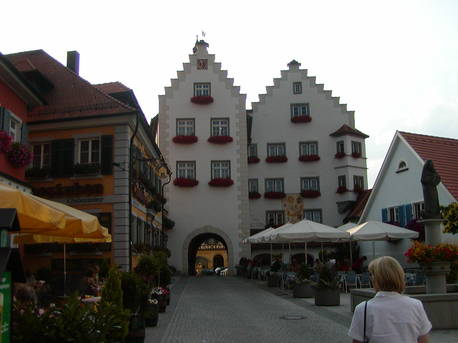 Torschloss in Tettnang Sonstiges